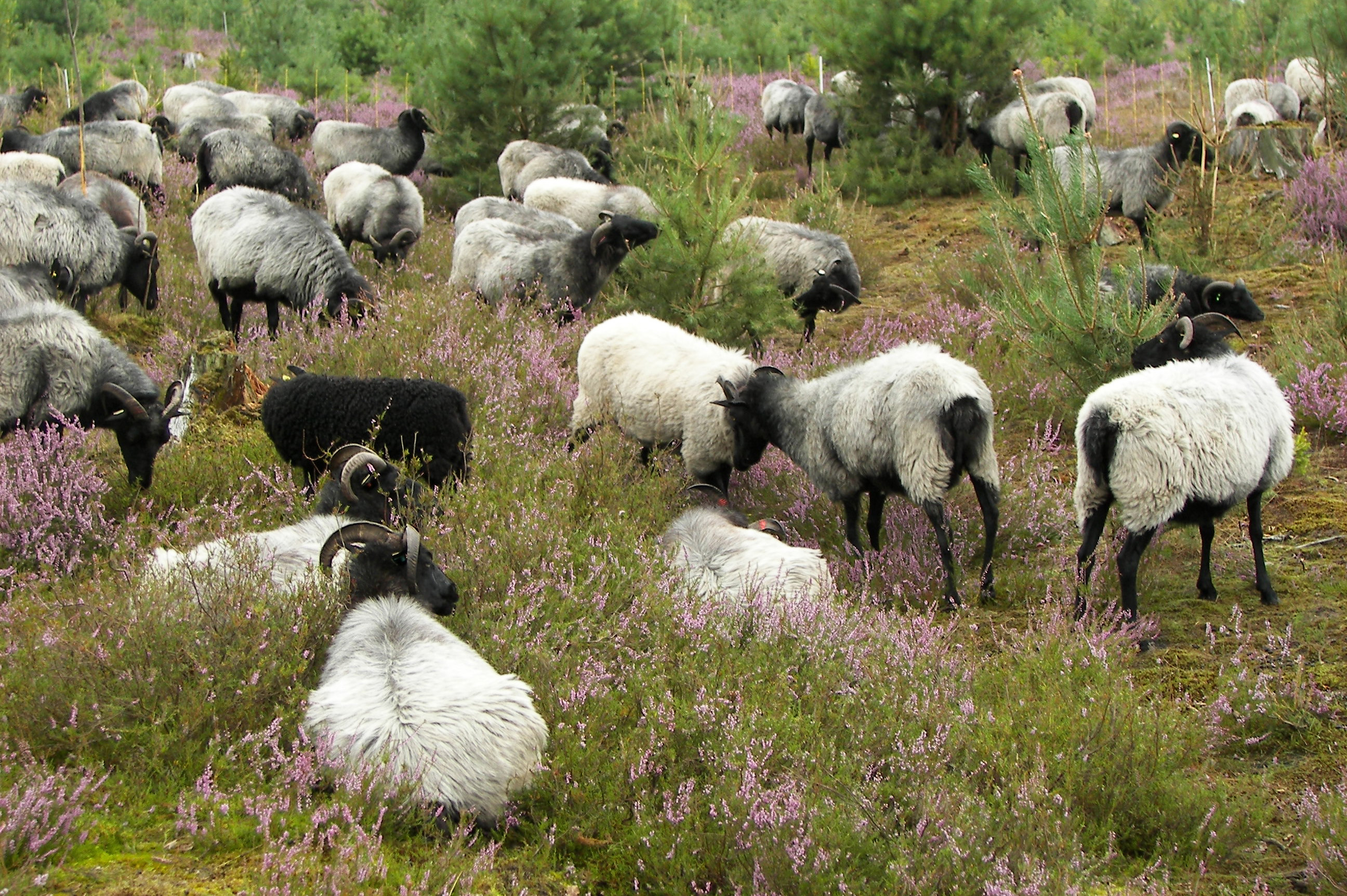 Lüneburger Heide - Heidschnucken im Heidetal bei Niederhaverbeck